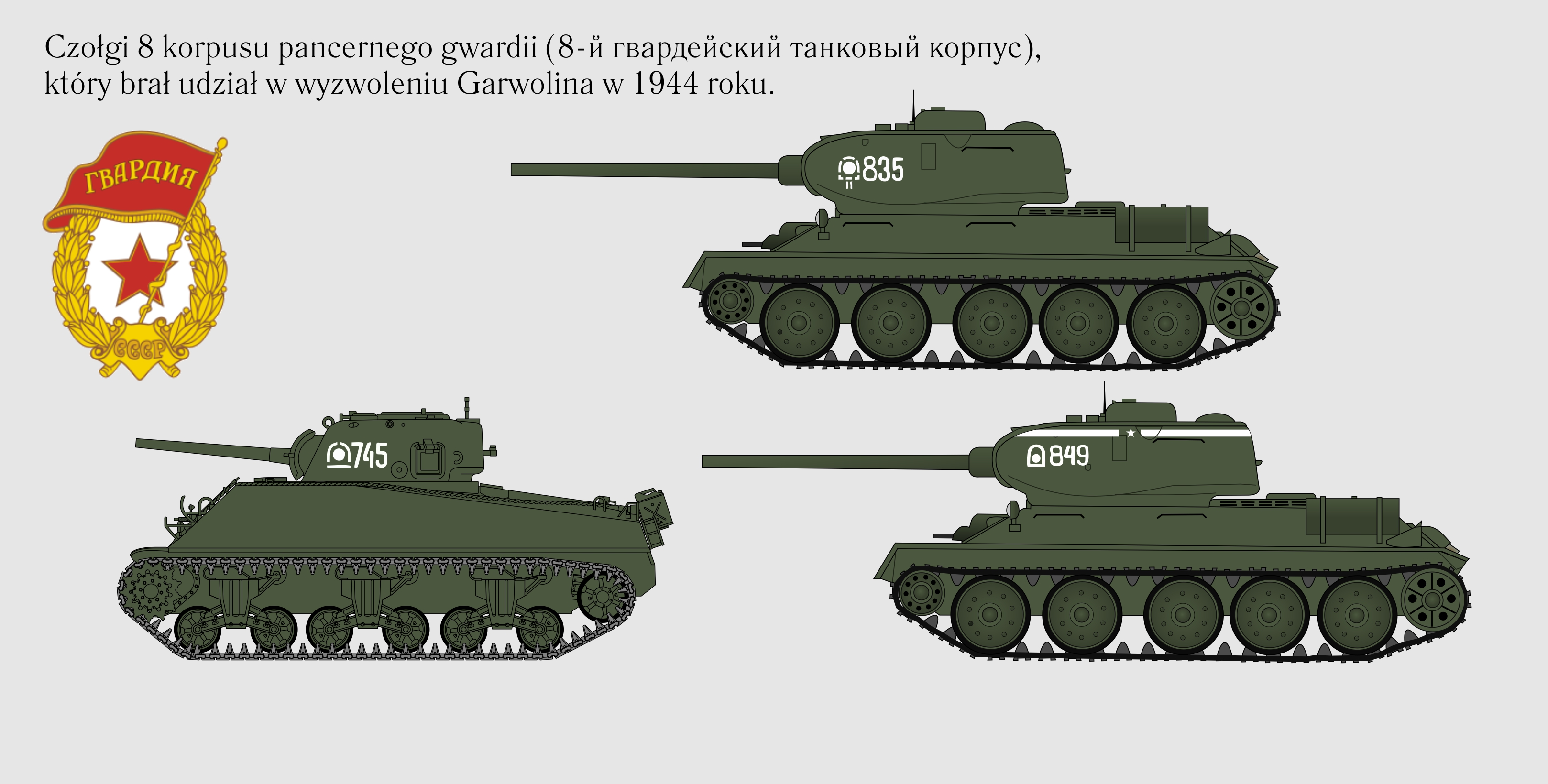 Czołgi 8KPancGw Bitwa o Garwolin 1944